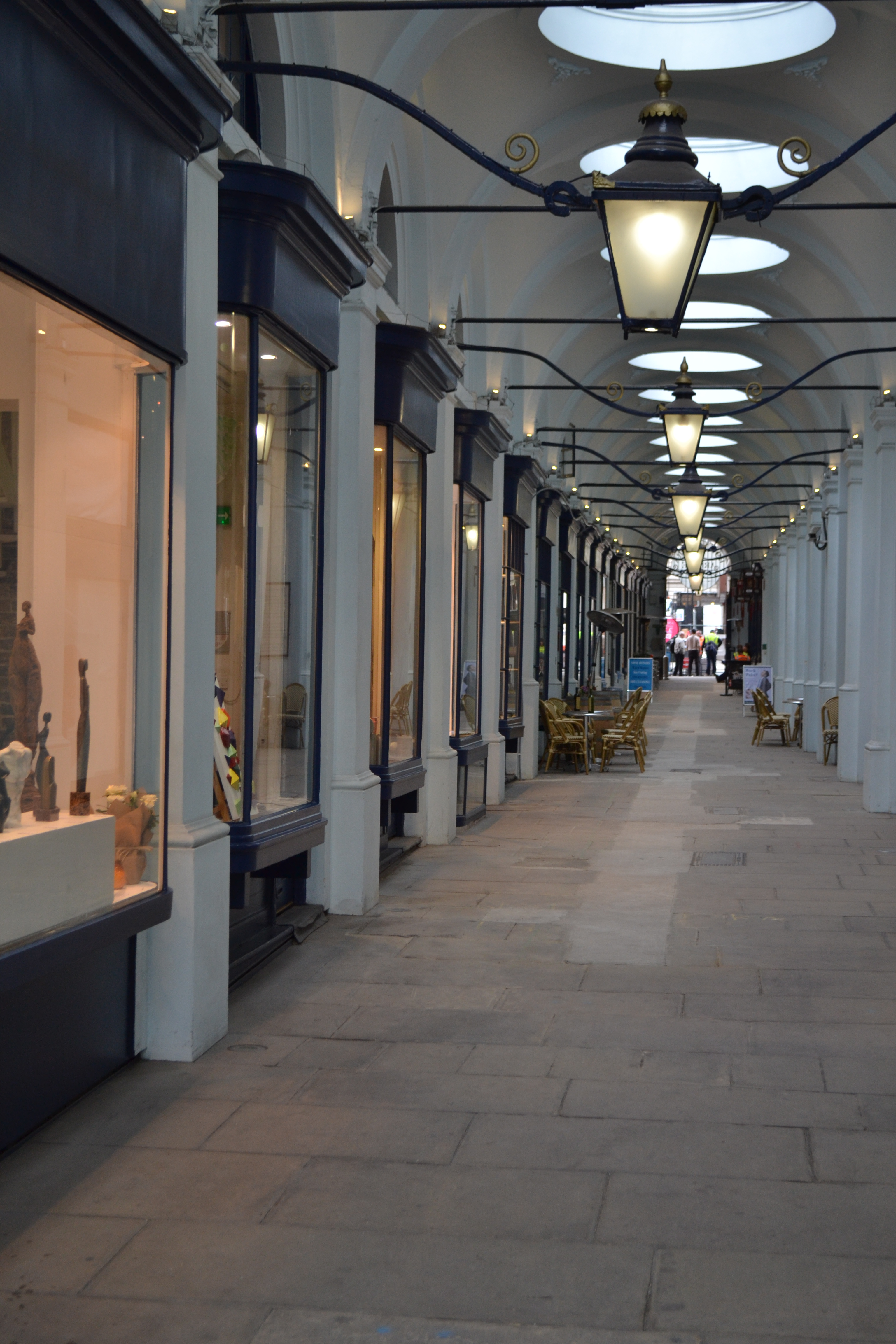 Royal Opera Arcade, plus ancien "passage" londonien (1821), situé près de Waterloo Place.